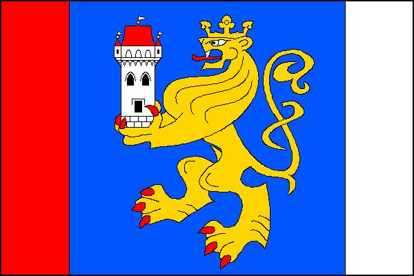 Vlajka obce Přílepy (okres Kroměříž)